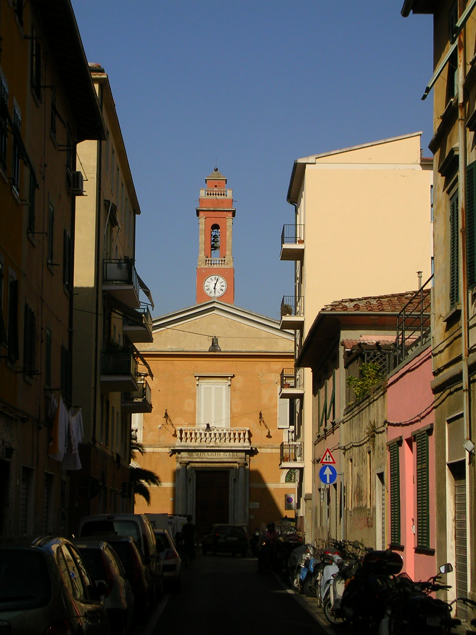 Livorno: il Seminario Gavi, adiacente alla chiesa di Sant'Andrea (XIX secolo): sullo sfondo il campanile della suddetta chiesa.